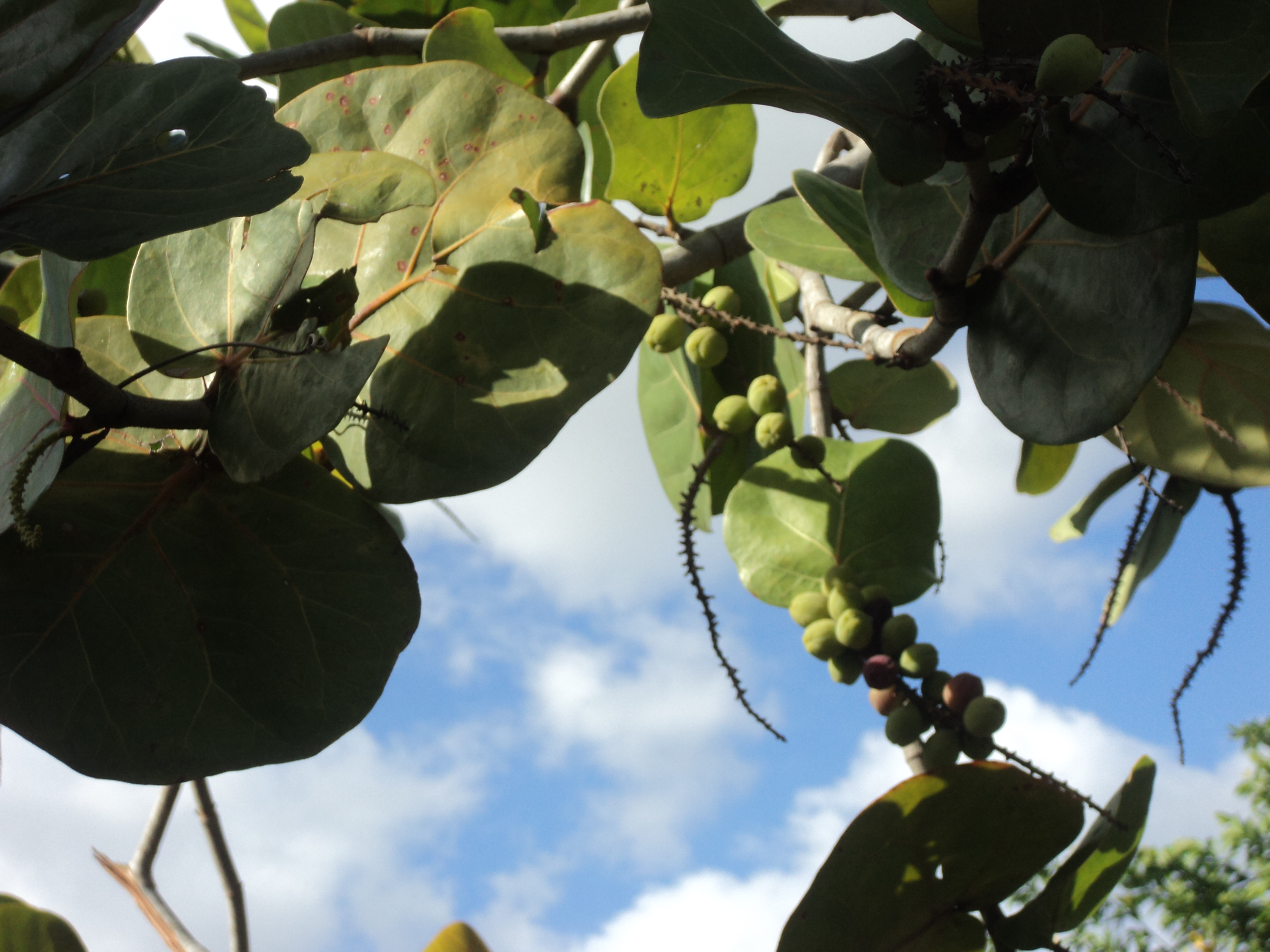 barrio la piedra, san pedro de macorís, republica dominicana.